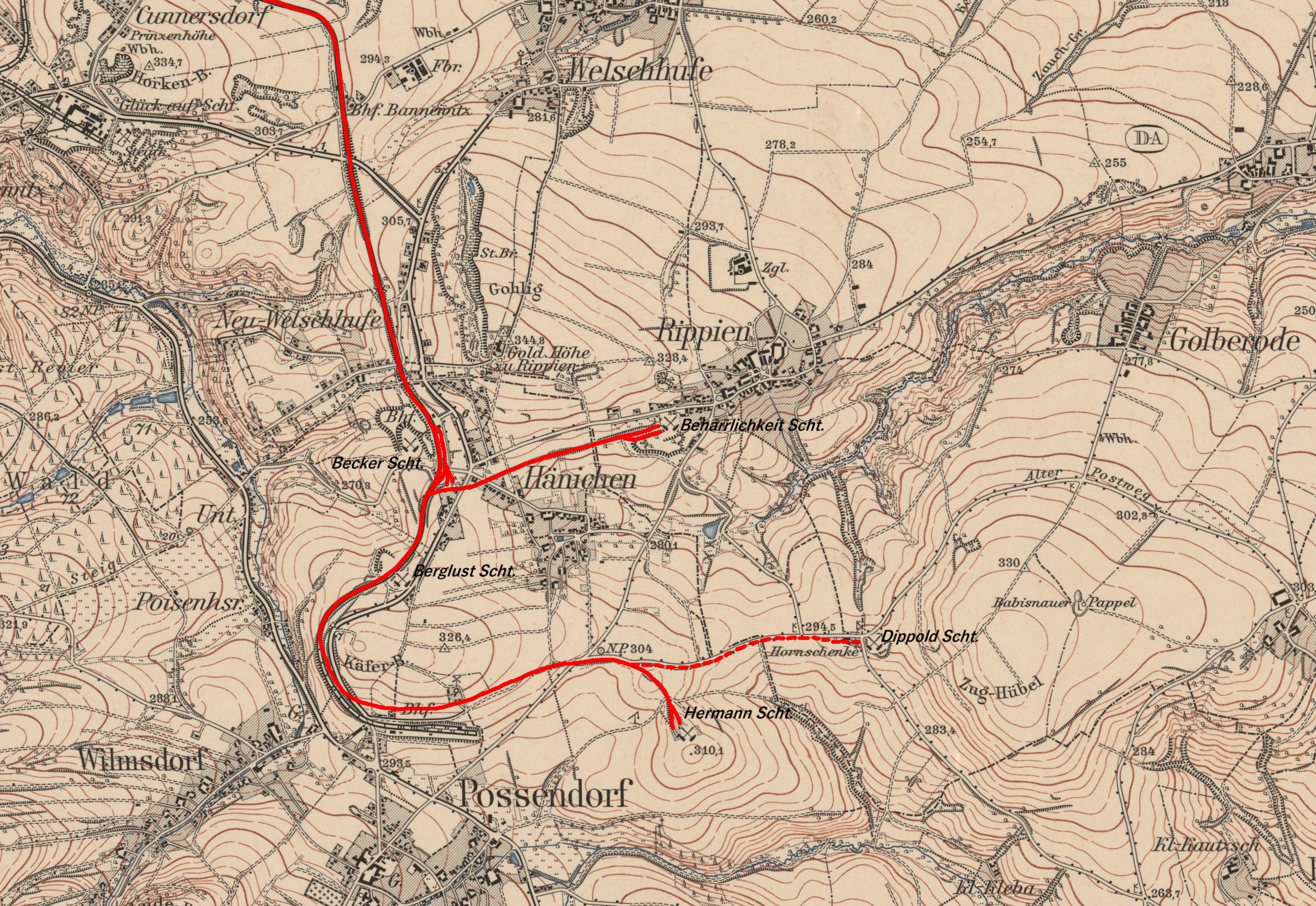 Topographische Karte (Messtischblätter) Sachsen, Ausschnitt Kreischa Blatt 82, 1:25000, 1912, Kohlebahn.